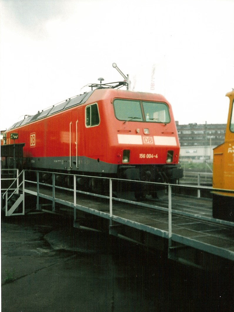 156 004 auf der Drehscheibe des Betriebswerk Dresden Altstadt anlässlich des Dresdener Dampflokfests 2002.